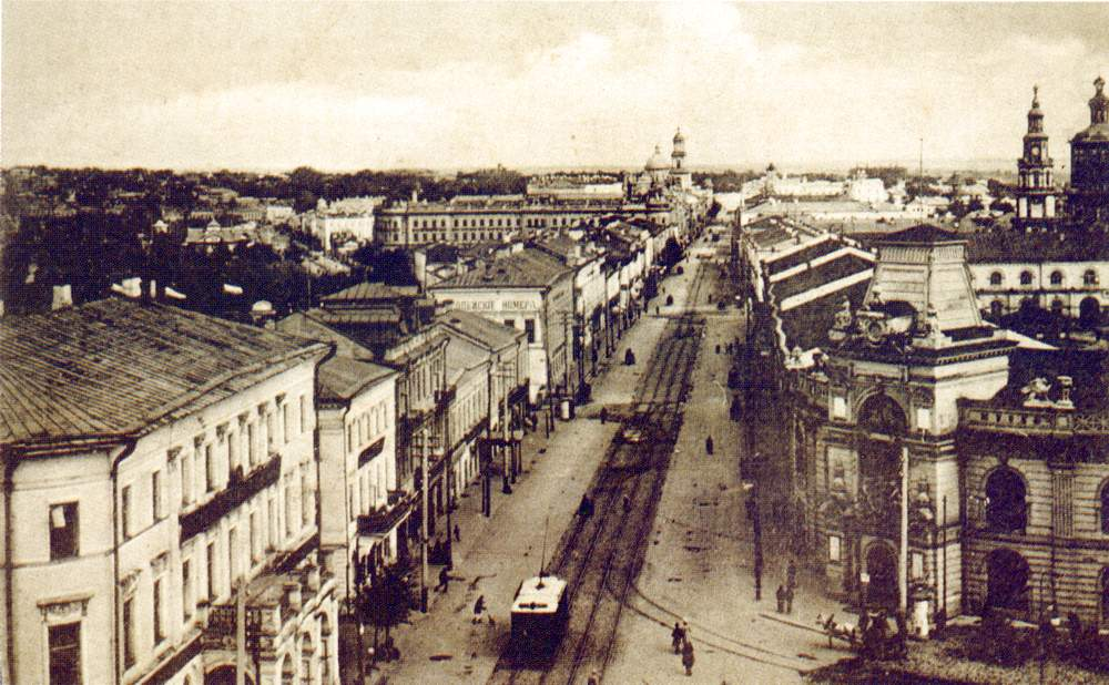 Воскресенская улица Казани.